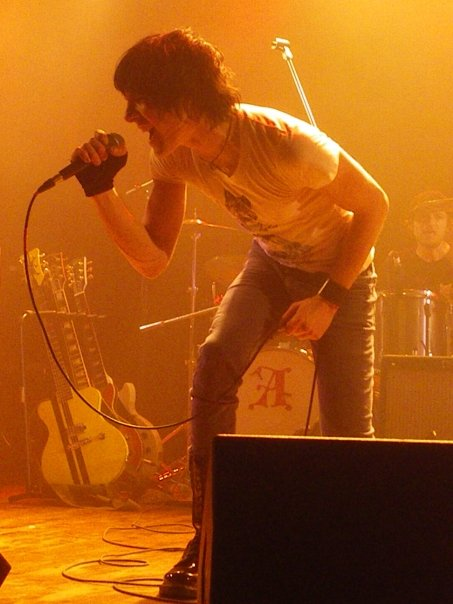 Ariel Coulombe en concert au Lion d'Or - 2010 Photo : Yanique Fillion-Simard